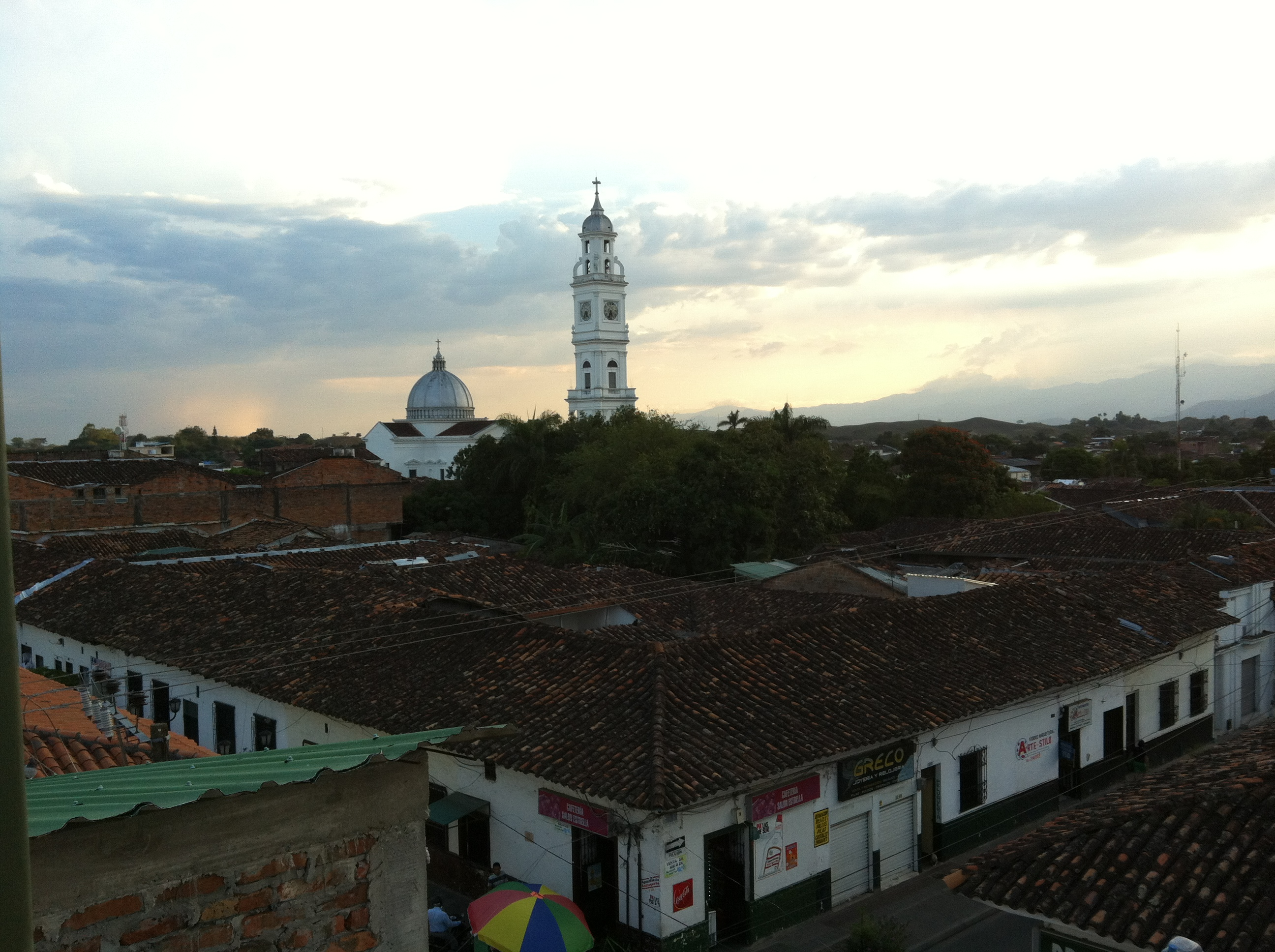 torre de la catedral, cartago valle